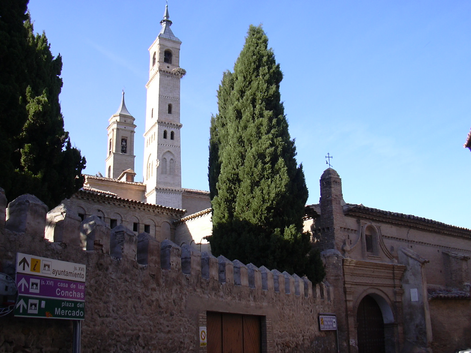 Borja